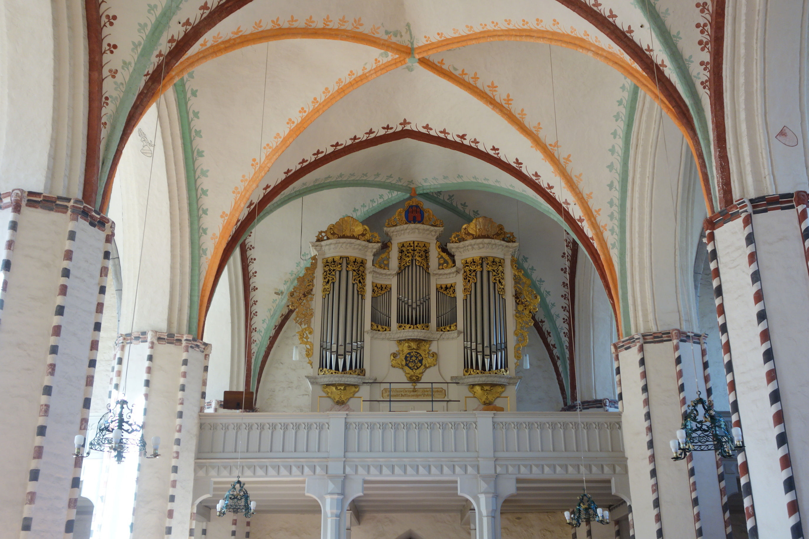 Orgel der Marienkirche Gransee, Landkreis Oberhavel, Brandenburg, Deutschland